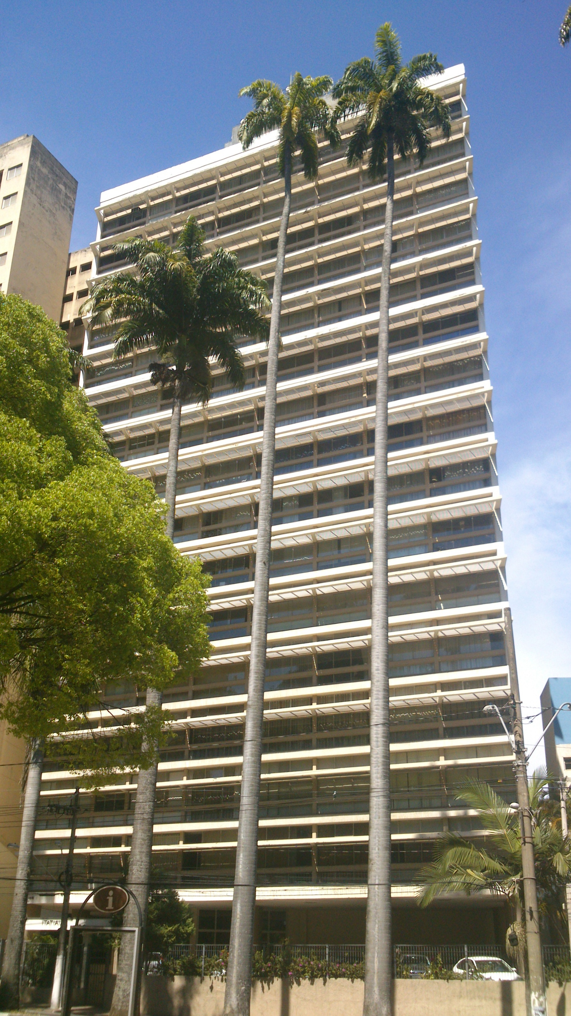 Fachada frontal do Edifício Itatiaia, vista a partir da Rua Irmã Serafina. Campinas, SP, Brasil.